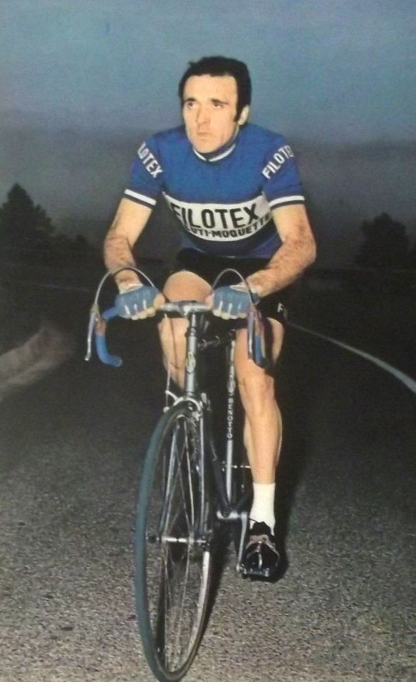 Cartolina Ciclismo - Filotex - Ugo Colombo